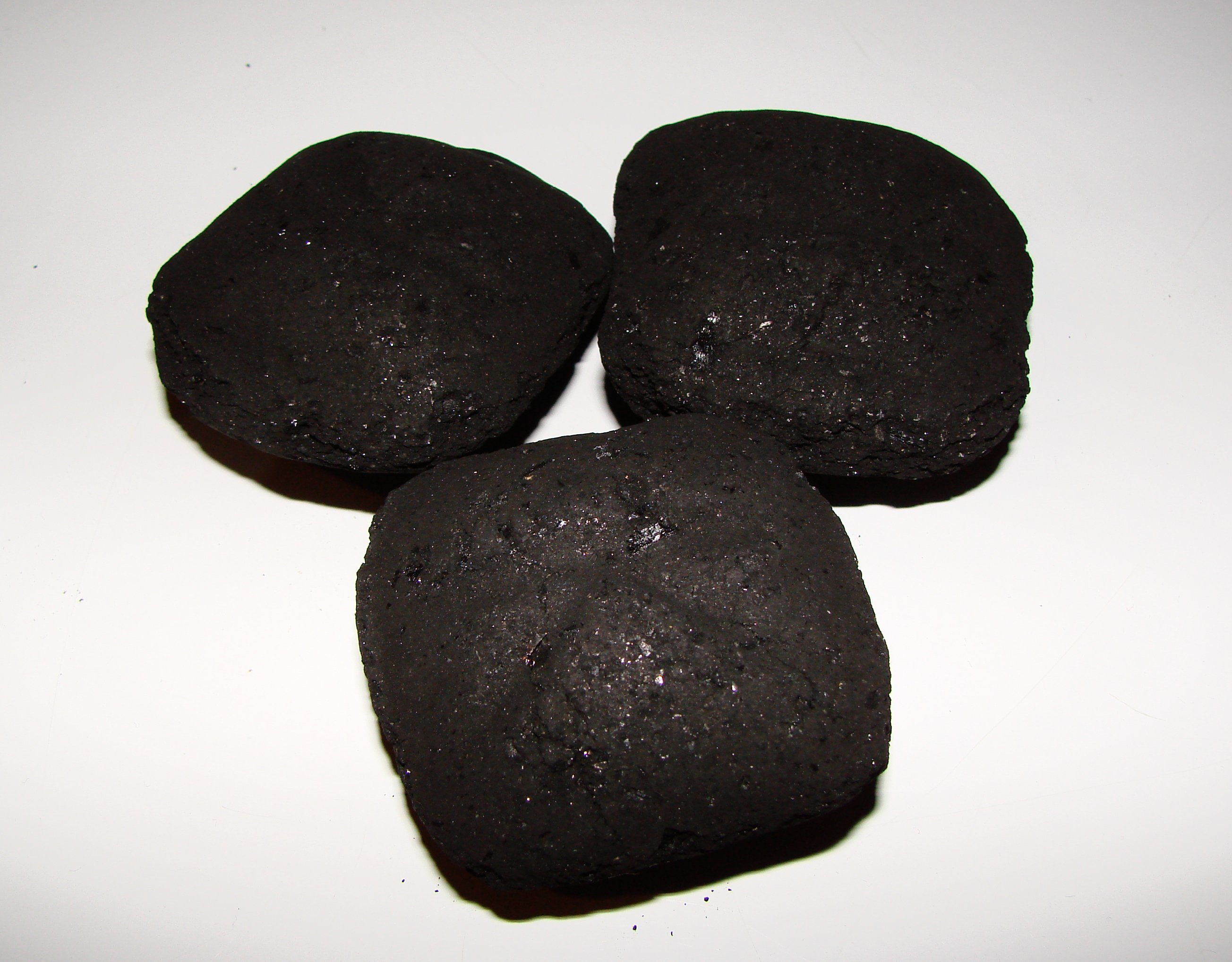 Some charcoal briquettes